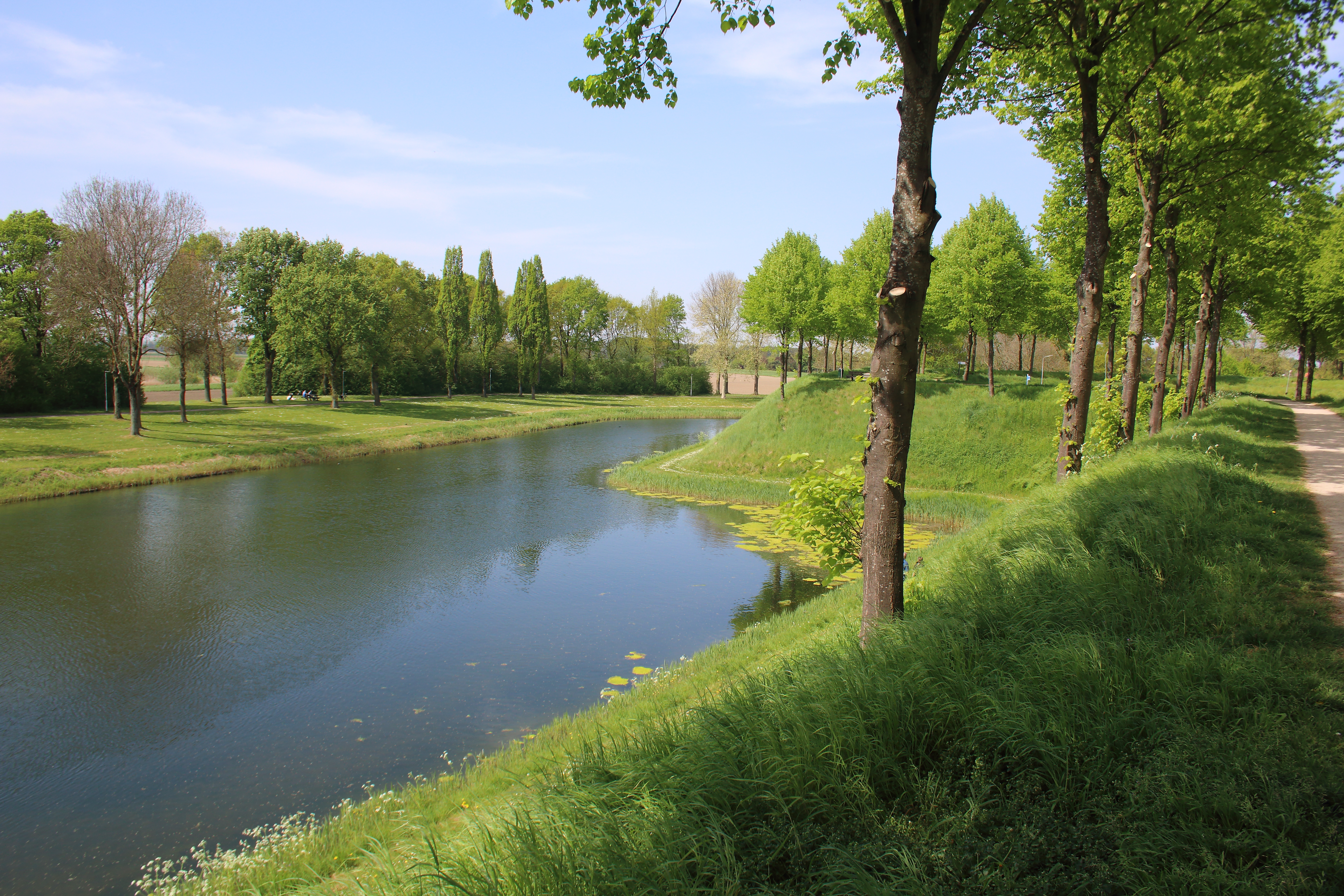 Stadswallen van Hulst (vestingstad), Zeeuws-Vlaanderen, Zeeland, Nederland